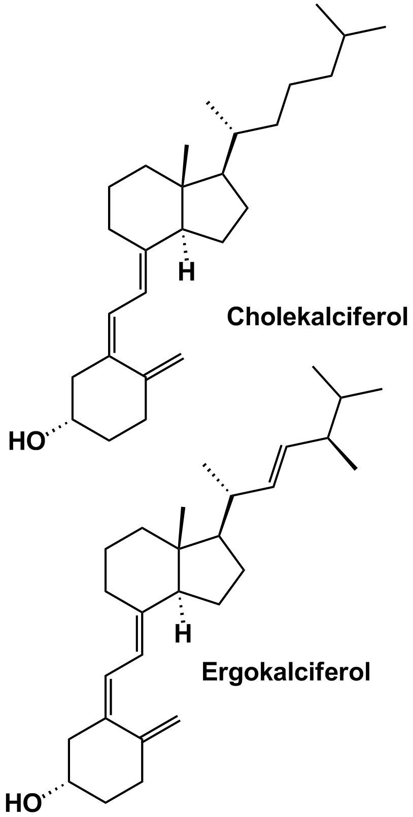 Kalciferoly, cholekalciferol a ergokalciferol.